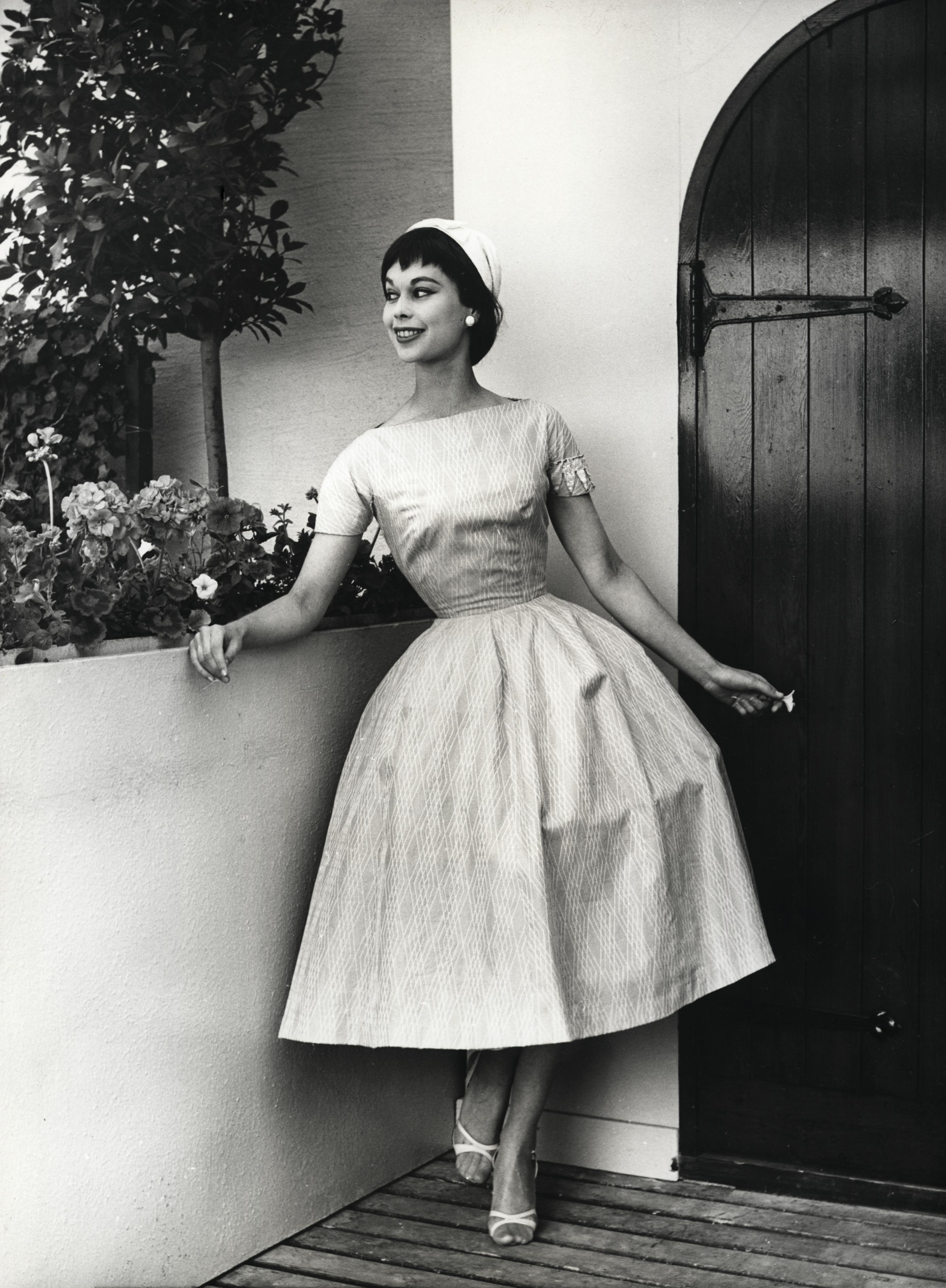 Nordiska Kompaniet visar dammode i samband med utställningen H55 i Helsingborg. Modellen Gunilla Pontén är klädd i klänning av cerisefärgad, mönstervävd bomull från Stobo skapad av Göta Trägårdh. Ämnesord: Kläder, Kvinna, Mode.